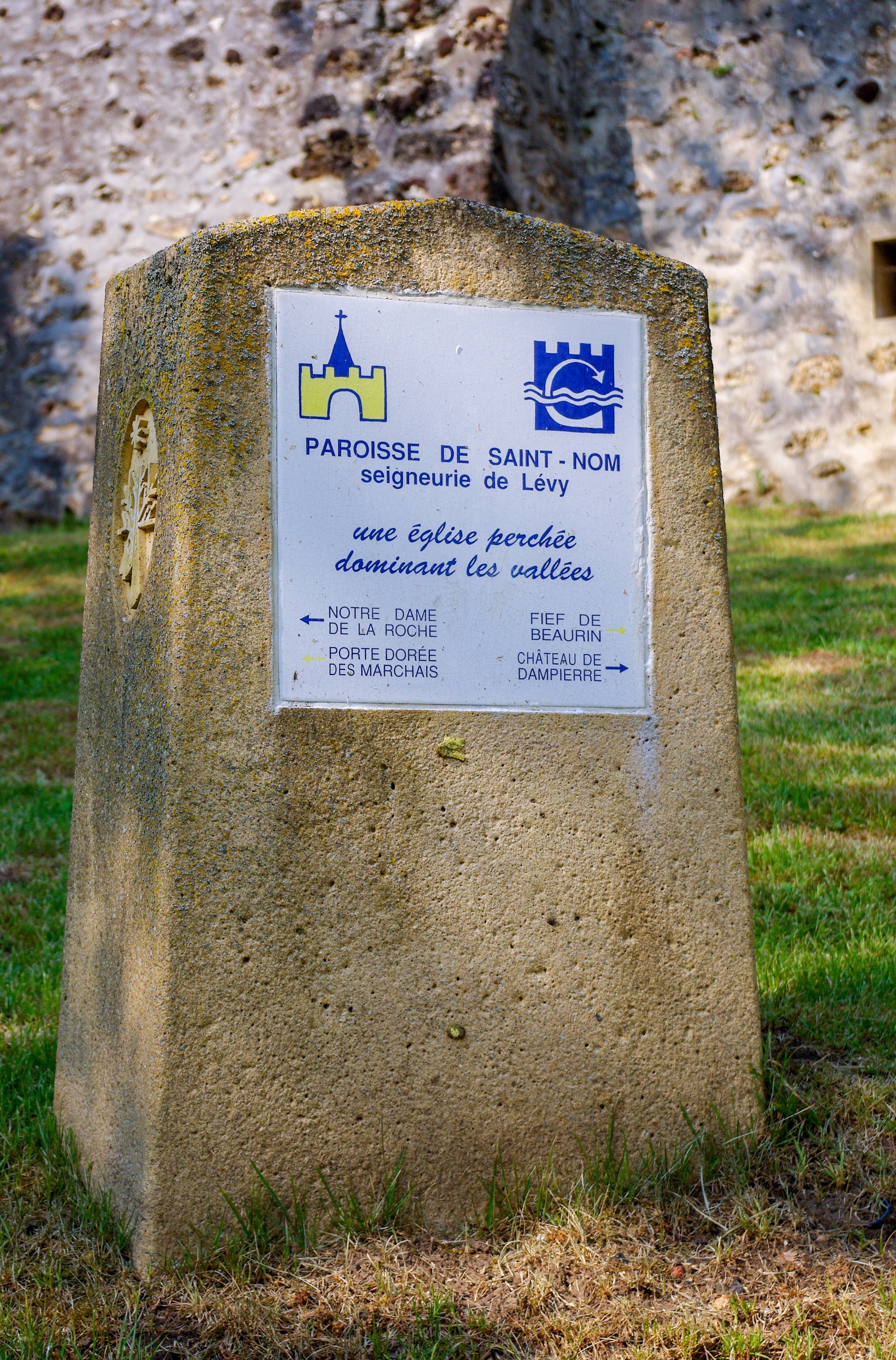 Plaque rappelant la seigneurie de Lévy à Lévis Saint-Nom